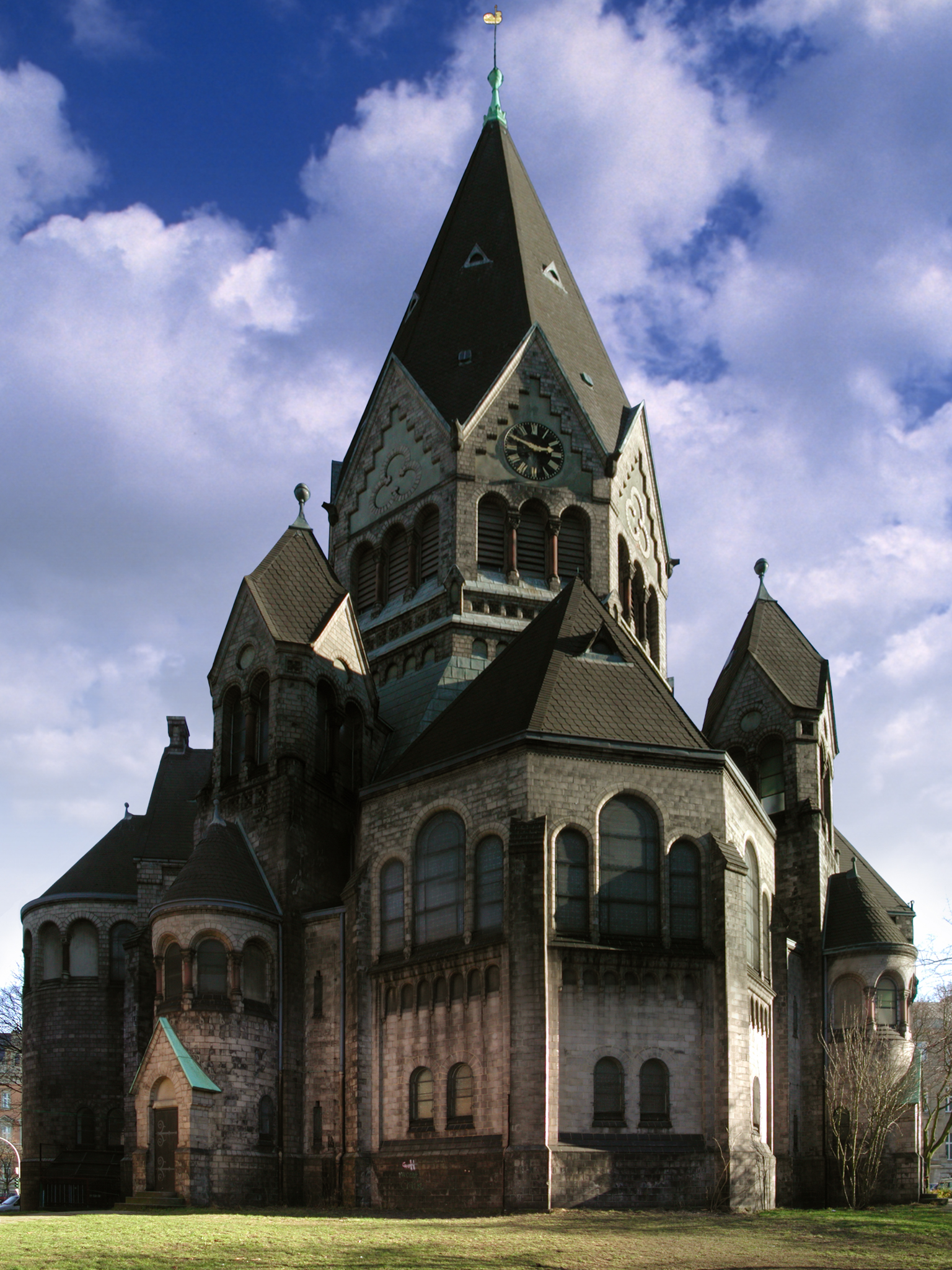 Gnadenkirche Hamburg-St.Pauli. This is the photograph of an architectural monument. It is part of the list of cultural monuments of Hamburg, no. 1702